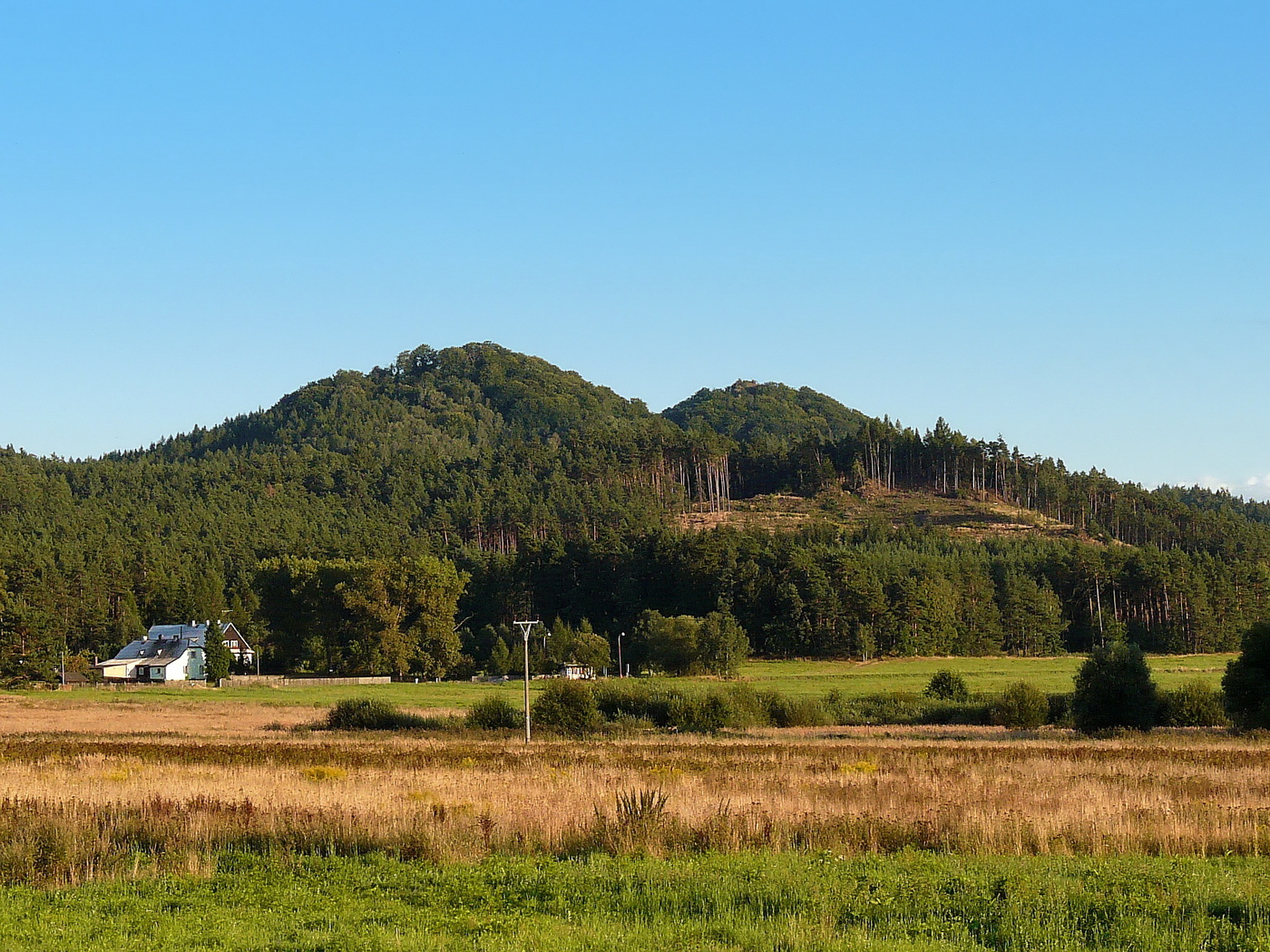 Malý a Velký Jelení vrch (zleva) ze Stráže pod Ralskem